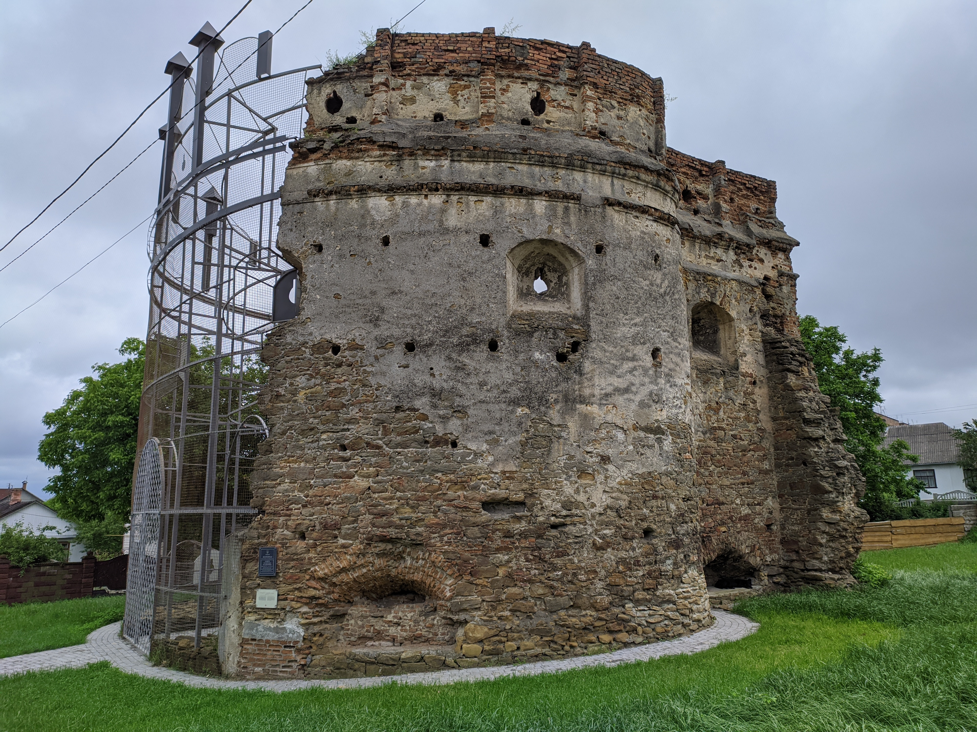 Татарська вежа (Культурний Барбакан), 2020 р.